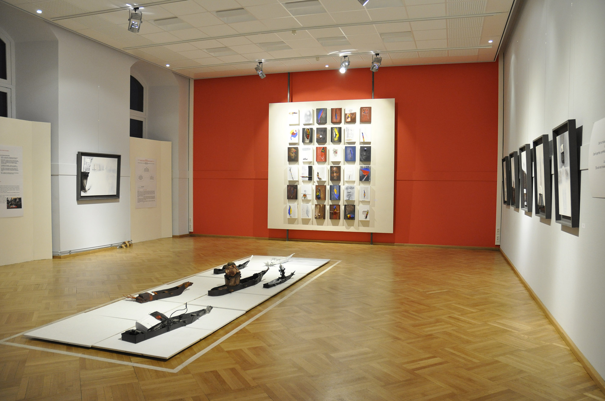 prémontrés